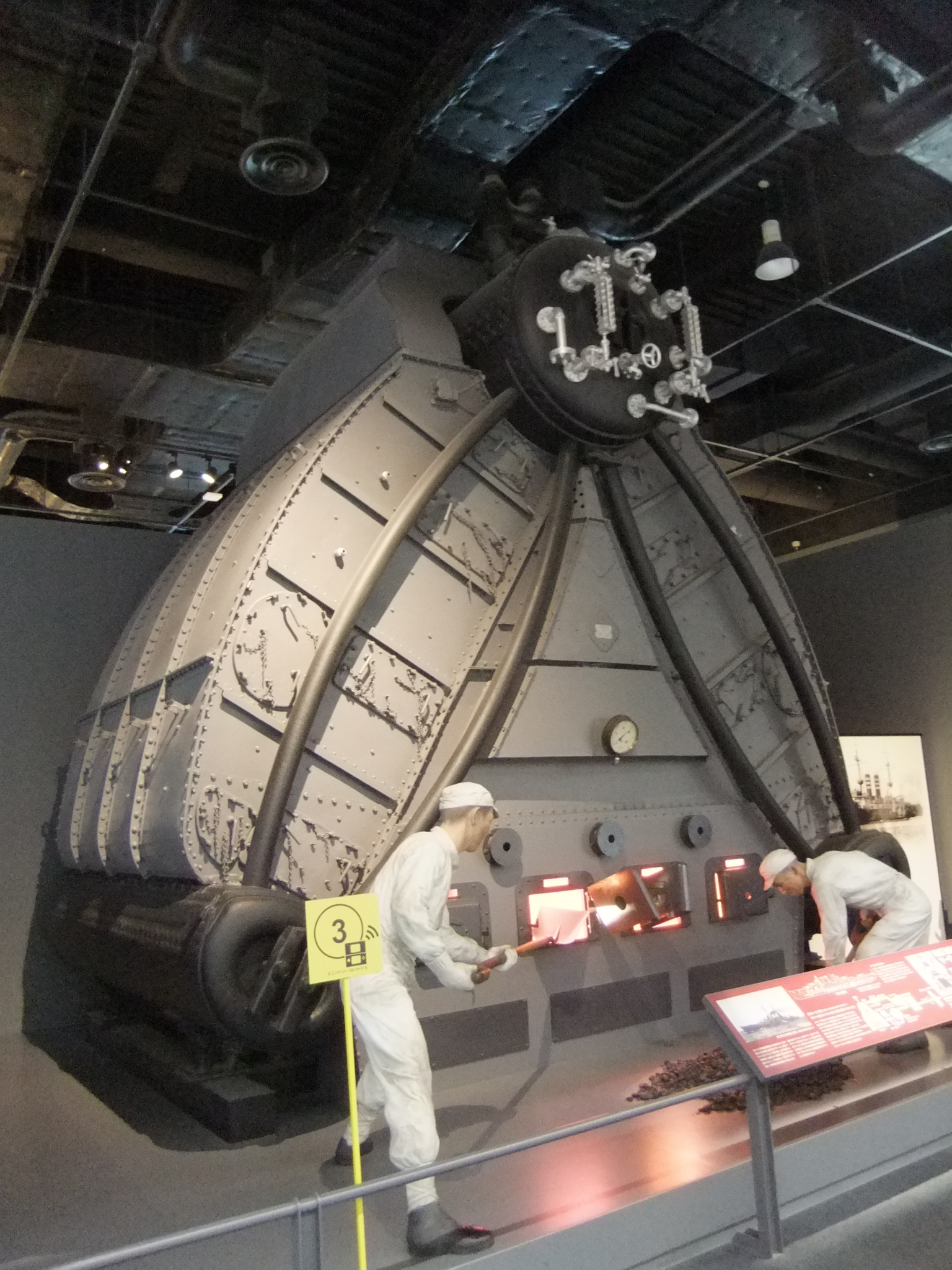 巡洋戦艦金剛に積まれていたヤーロー缶 大和ミュージアムに展示